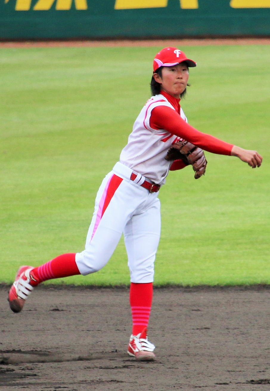 ウエスト・フローラ内野手の小西つどい。わかさスタジアム京都にて。